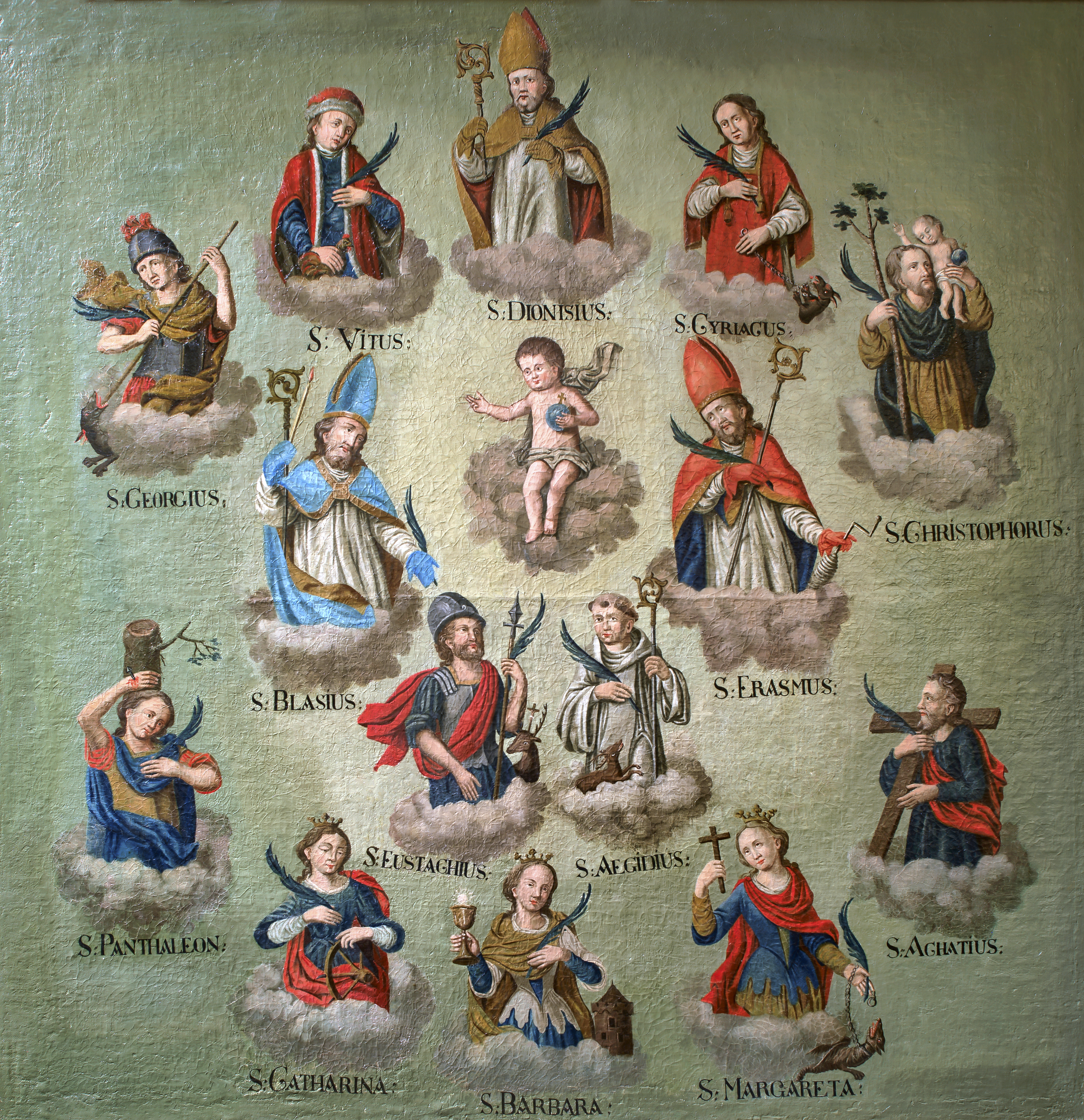 Pfarrirche St. Margaretha in Bruttig, Gemälde 18. Jahrhundert, Die 14 Nothelfer (darunter St. Margaretha)